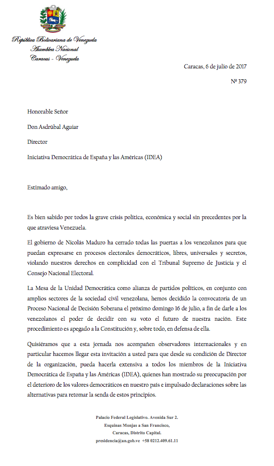 Invitación de Julio Borges, presidente de la Asamblea Nacional de Venezuela, a ex presidentes como observadores en la consulta nacional del 16 de julio de 2017